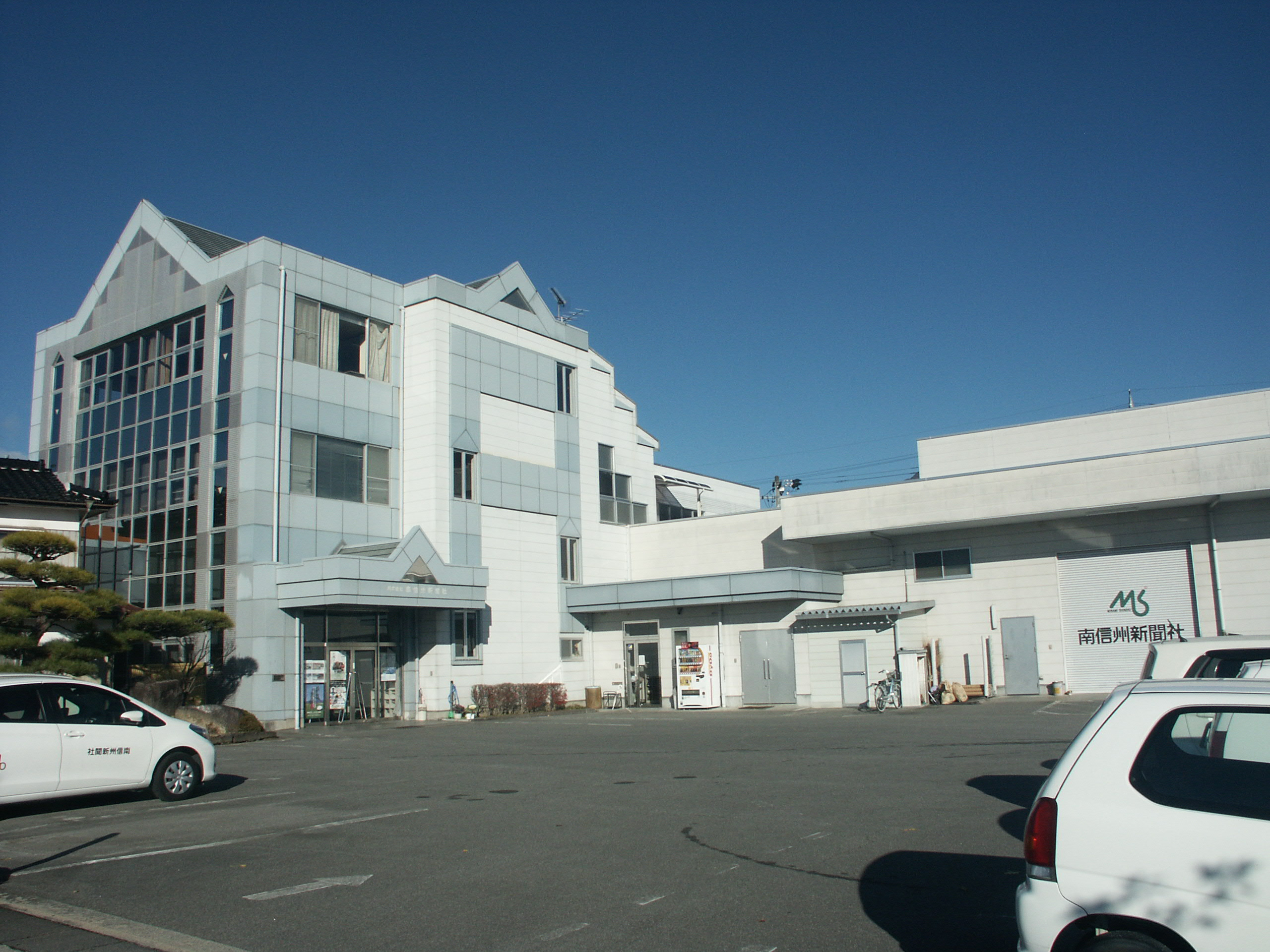 長野県飯田市にある南信州新聞社本社